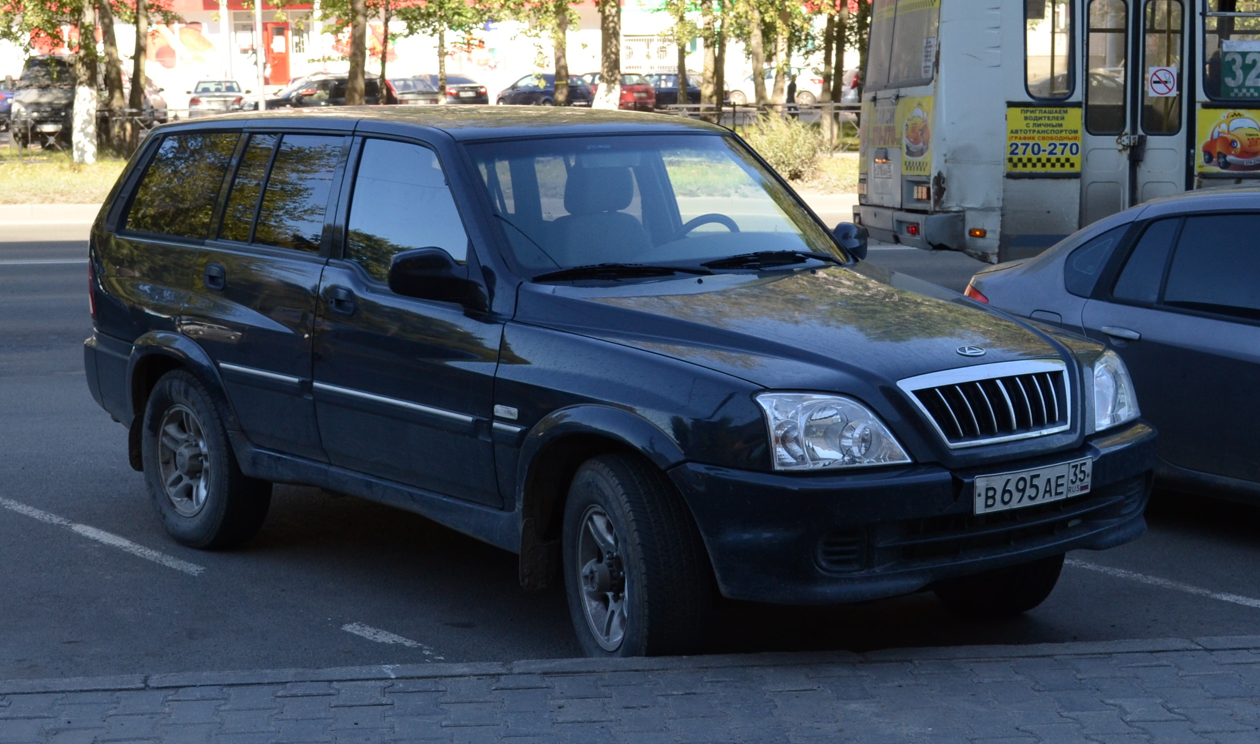 Внедорожник Tagaz Road Partner, рестайлинг 2009 года